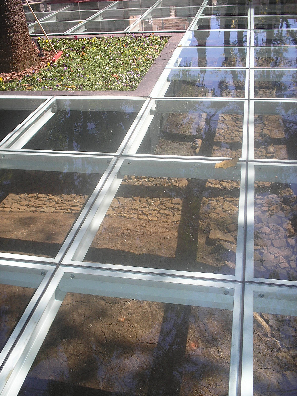 Detalhe do calçamento arqueológico encontrado na Praça Tiradentes, no Centro de Curitiba, Paraná, Brasil, protegido com vidro.